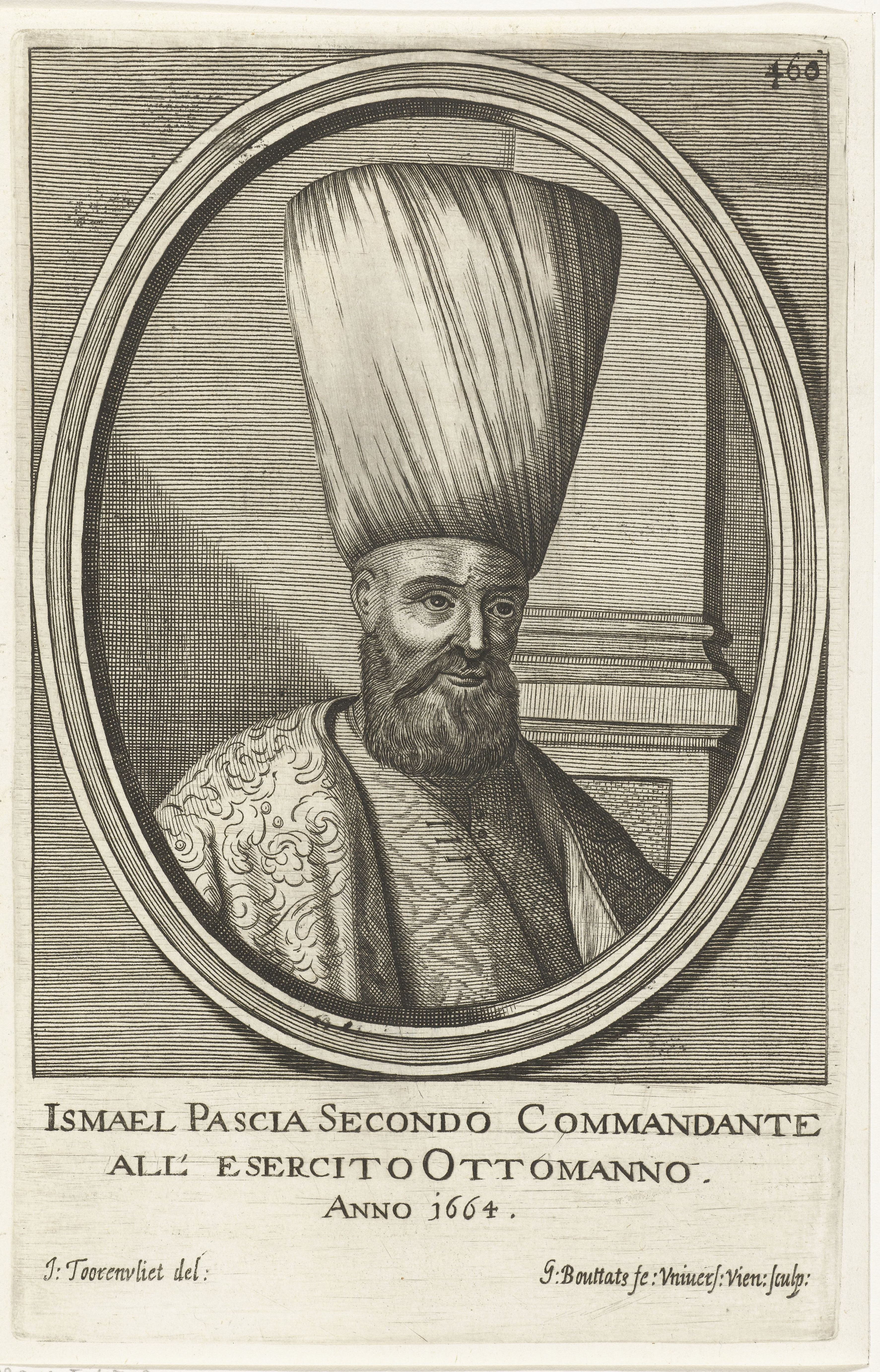 IdentificatieTitel(s): Portret van Ismael PasciaObjecttype: prent Objectnummer: RP-P-1905-4793Opschriften / Merken: verzamelaarsmerk, verso midden, gestempeld: Lugt 2228nummer, recto rechtsboven, gestempeld: 460Omschrijving: Portret in een ovale lijst van Ismael Pascia, de ondercommandant van het Ottomaanse leger. Buste naar rechts. Pascia draagt een Ottomaans gewaad (kaftan) een een enorme tulband (Sarik). De prent heeft een Italiaans onderschrift met de naam van de geportretteerde.VervaardigingVervaardiger: prentmaker: Gerard Bouttats (vermeld op object)naar tekening van: Jacob Toorenvliet (vermeld op object)Plaats vervaardiging: WenenDatering: 1664Fysieke kenmerken: gravureMateriaal: papier Techniek: graveren (drukprocedé)Afmetingen: plaatrand: h 235 mm × b 149 mmOnderwerpWat: head-gear: turbanAsiatic races and peoples: TurksWie: Ismael PasciaVerwerving en rechtenVerwerving: aankoop 1905Copyright: Publiek domein